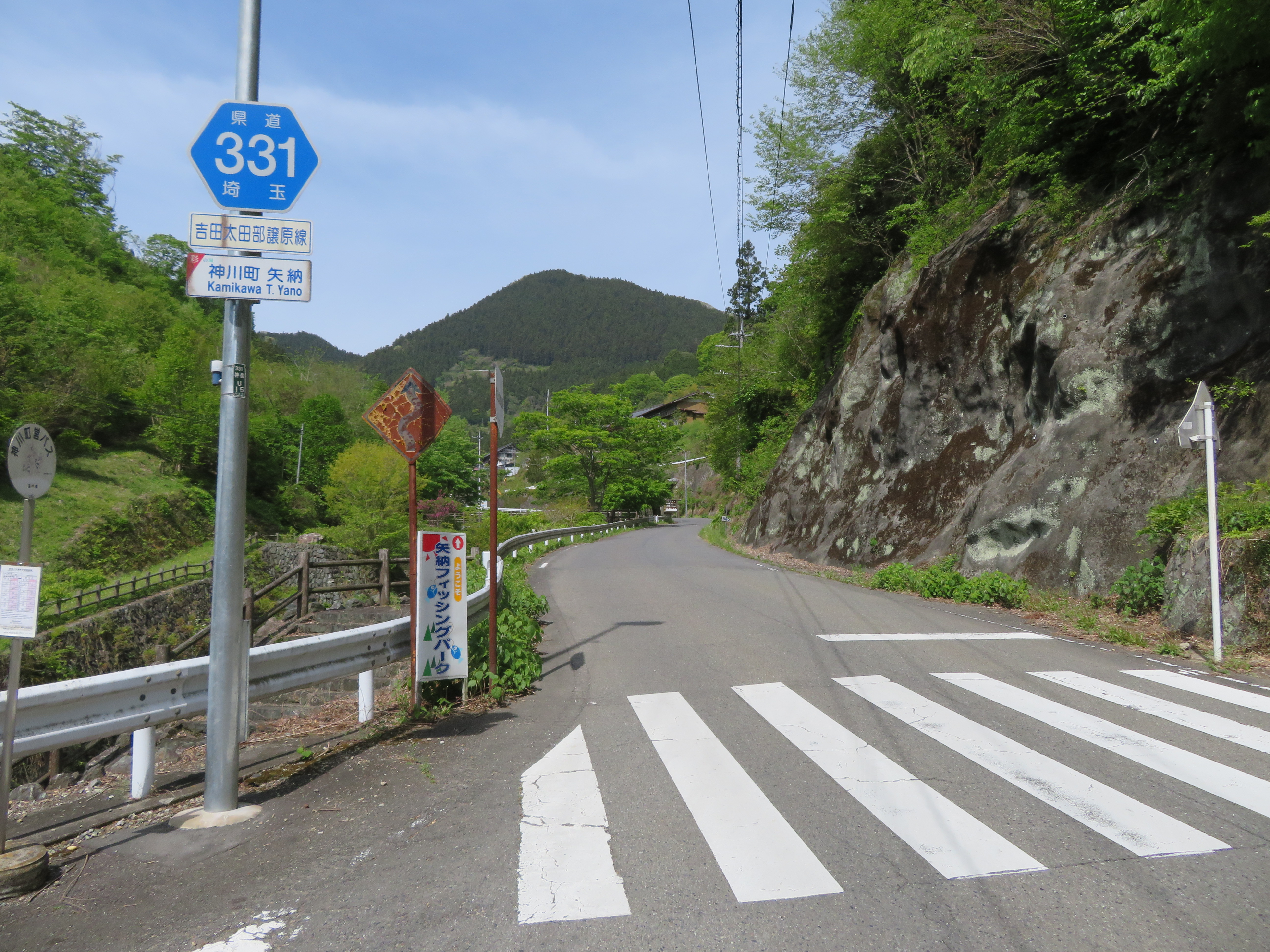 埼玉県道331号線神川町矢納付近（秩父市吉田方面を撮影） Canon PowerShot SX720 HS